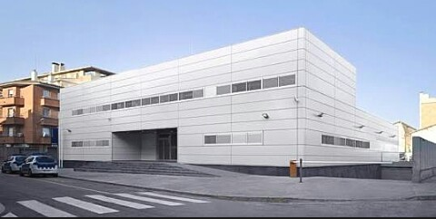 Comisaría de los Mozos d'Esquadra en Cornellá de Llobregat (Baix Llobregat, provincia de Barcelona).